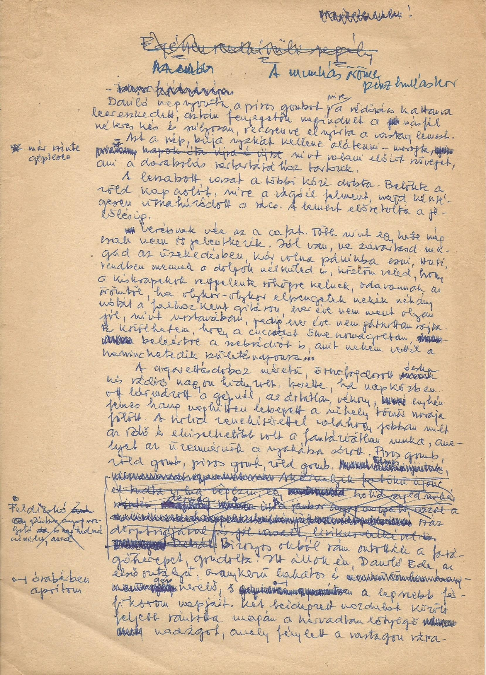 A munkás öröme pénzhulláskor - Pintér Tamás kézirata